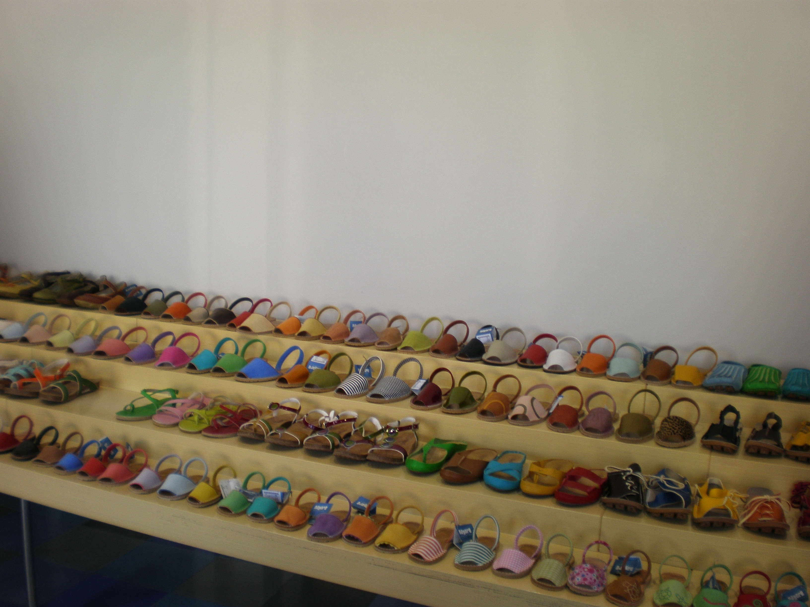 avarcas, alpargatas típicas de Menorca